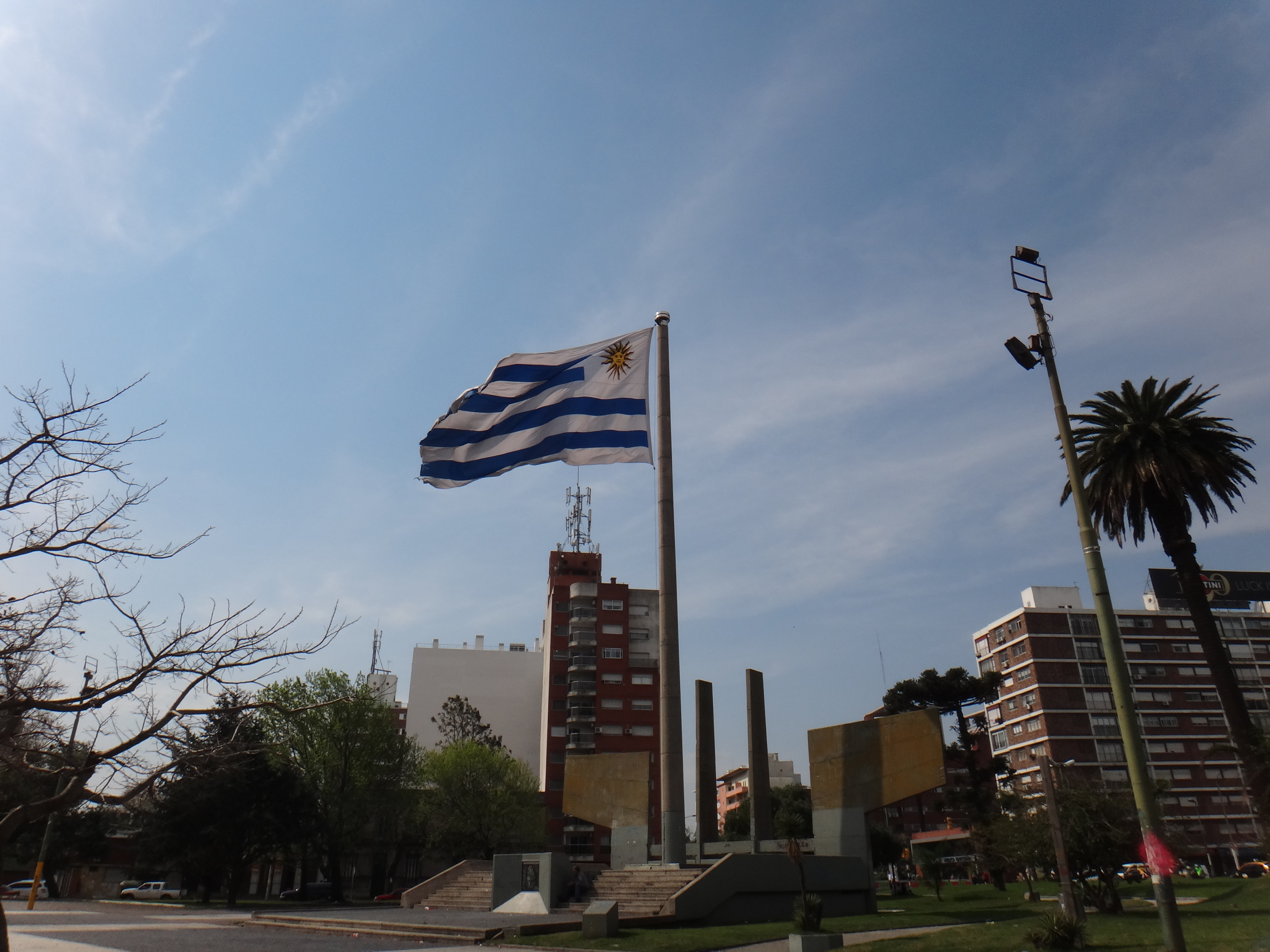 Monumento a la bandera en la Plaza de la Democracia, Montevideo. Situación en 2013 (posteriormente, este monumento fue modificado).